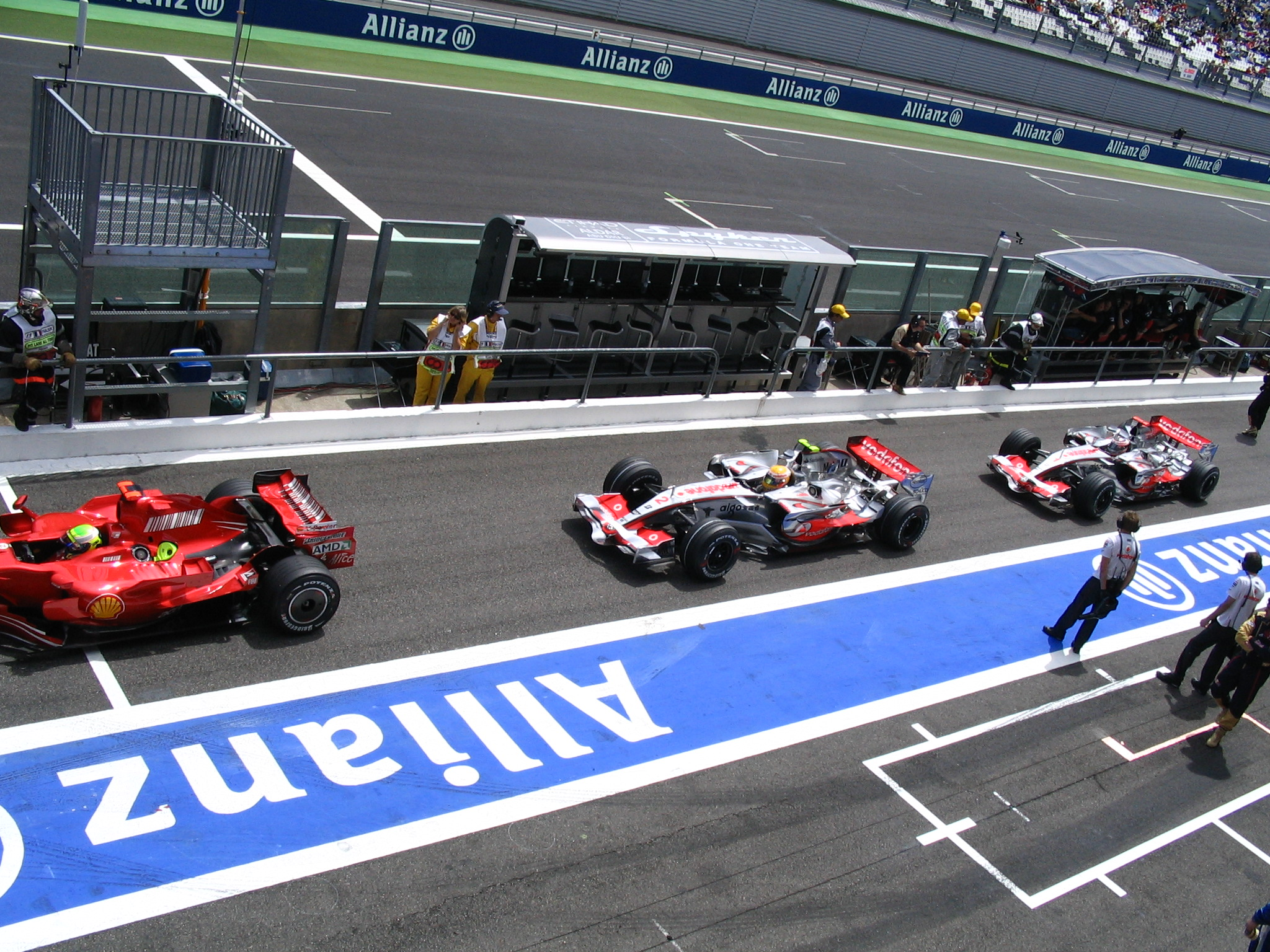 Circuit de Magny Court, Grand Prix de FranceDe gauche à droite, Felipe Massa, Lewis Hamilton et Fernando Alonso